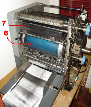 foto de uma impressora offset de mesa, vista na entrada do papel, feita por mim.